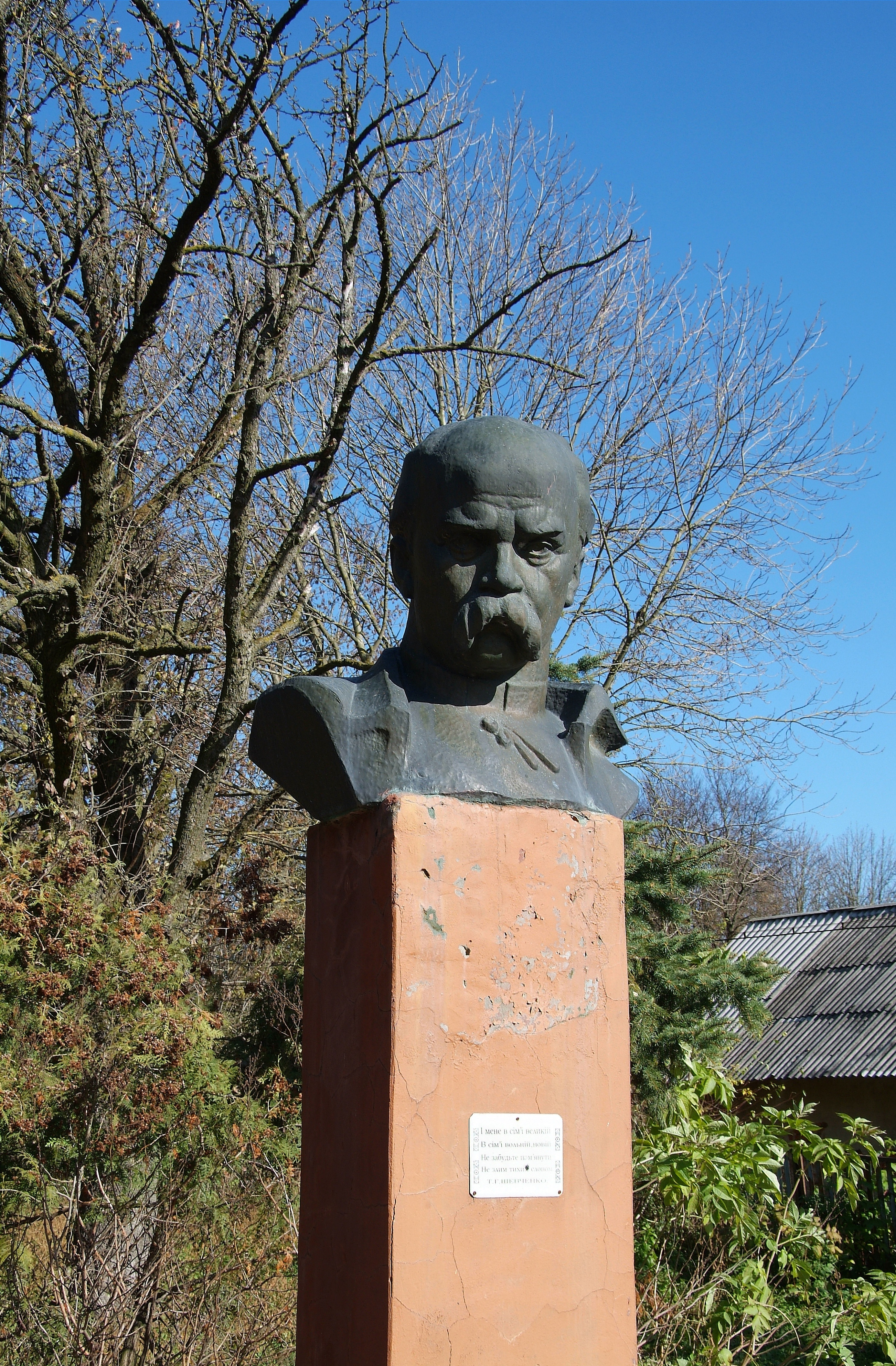 Пам'ятник поету, письменнику, художнику Шевченку Тарасу Григоровичу, село Велика Плавуча